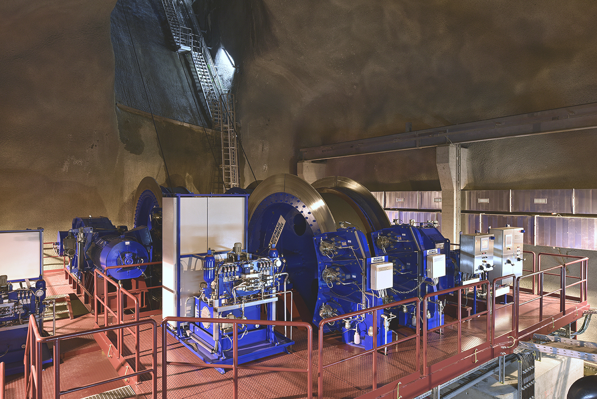 Aufnahme einer SIEMAG TECBERG Trommelfördermaschine im Gottgard-Basistunnel in der Schweiz.